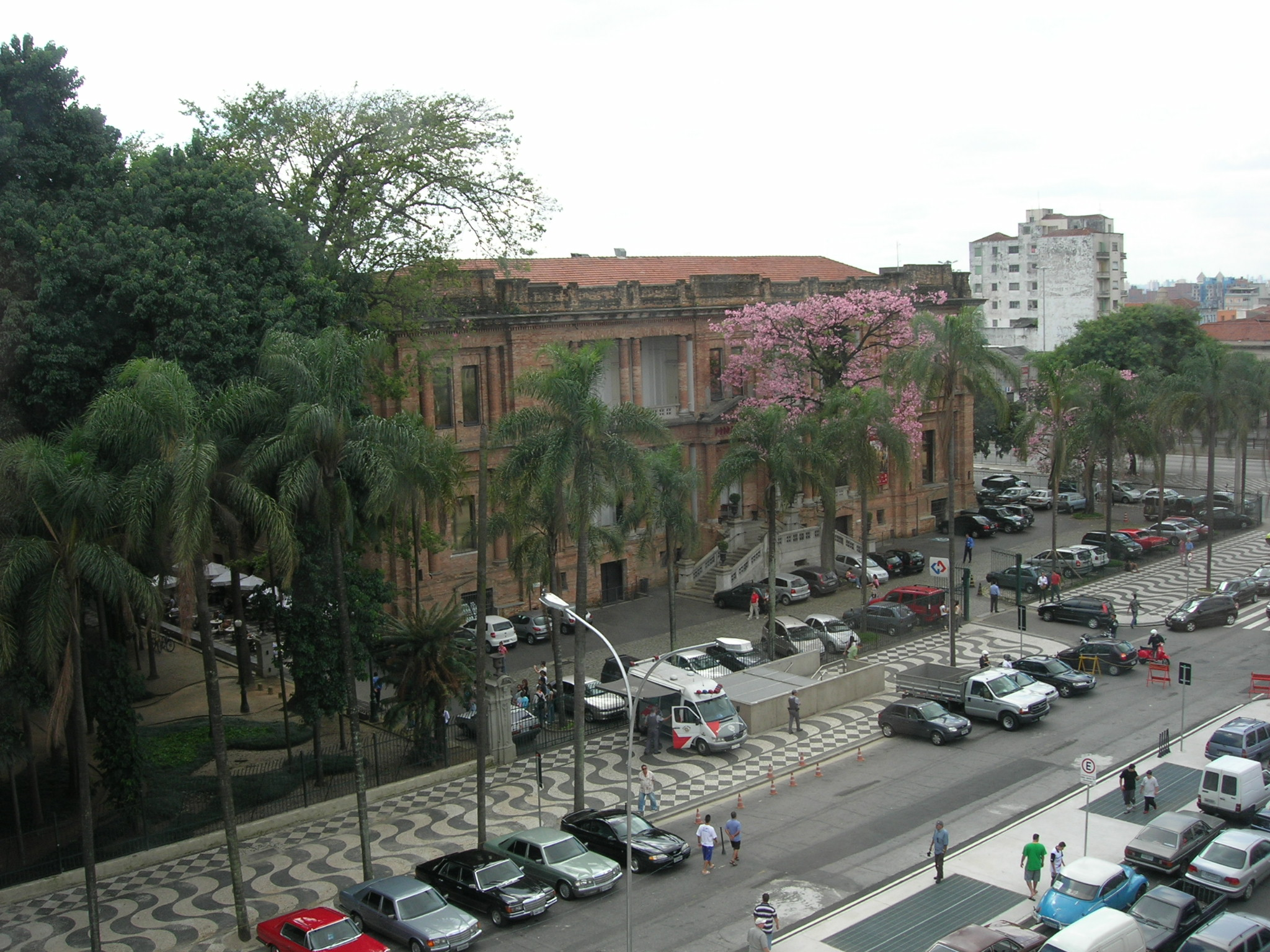 Picture taken by Usuário:Gabrielt4e. Shot of the Pinacoteca do Estado de São Paulo - São Paulo, SP. Foto tirada por Usuário:Gabrielt4e. Imagem do Pinacoteca do Estado de São Paulo - São Paulo, SP.